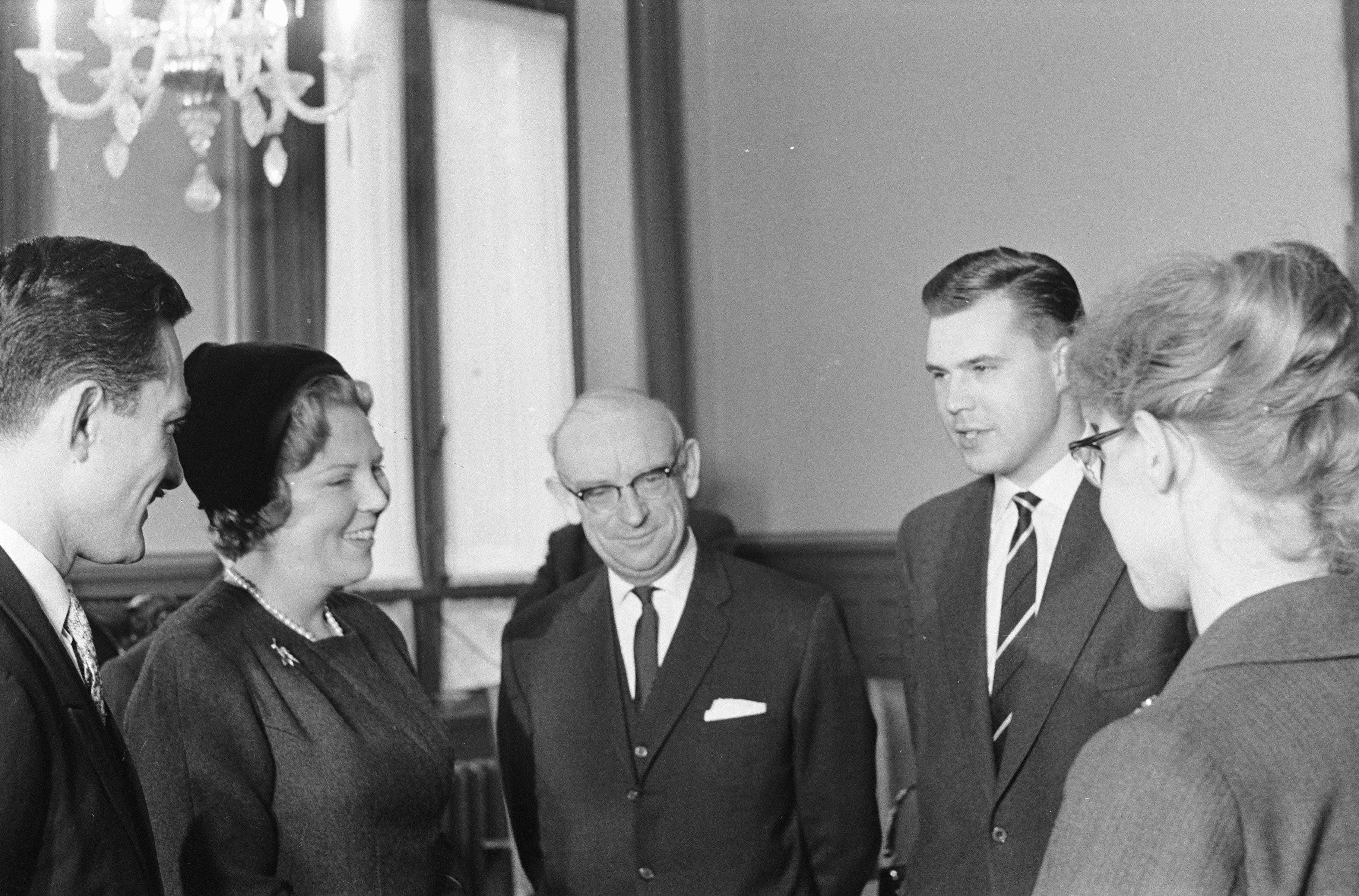 Collectie / Archief : Fotocollectie Anefo Reportage / Serie : [ onbekend ] Beschrijving : Prinses Beatrix beschermvrouwe inventaris Asylfonds bij Rijks C. Utrecht spreekt met vluchtelingen Datum : 18 november 1961 Locatie : Utrecht Trefwoorden : VLUCHTELINGEN, beschermvrouwen Persoonsnaam : Beatrix, prinses Fotograaf : Rossem, Wim van / Anefo Auteursrechthebbende : Nationaal Archief Materiaalsoort : Negatief (zwart/wit) Nummer archiefinventaris : bekijk toegang 2.24.01.05 Bestanddeelnummer : 913-2022